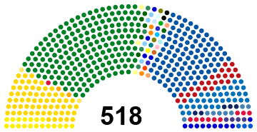 Resultado elecciones de regidores de Costa Rica de 2016 FA: 19 seats PAC: 64 seats CGMO: 2 seats CST: 2 seats AxB : 1 seat PLN: 188 seats CSXXI: 3 seats PAL: 5 seats YUNTA: 4 seats ASJ: 4 seats NMG: 3 seats VP: 3 seats AxP: 1 seat MASD: 1 seat RCLU: 1 seat PVEC: 1 seat PUG: 1 seat PAS: 2 seats PALABRA: 2 seats PSOL: 1 seat PECC: 1 seat ASLU: 1 seat PRA: 2 seats TPF: 1 seat LIRA: 1 seat PAMO: 1 seat PPG: 1 seat PAPI: 1 seat PRV: 1 seat PUSC: 103 seats PRSC: 24 seats PNG: 34 seats PIN: 5 seats PASE: 8 seats ML: 9 seats ADC: 4 seats PRC: 10 seats PREN: 3 seats